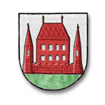 Coat of Arms of the former commuity of Obermenzing (today municipality of Munich, Bavaria)